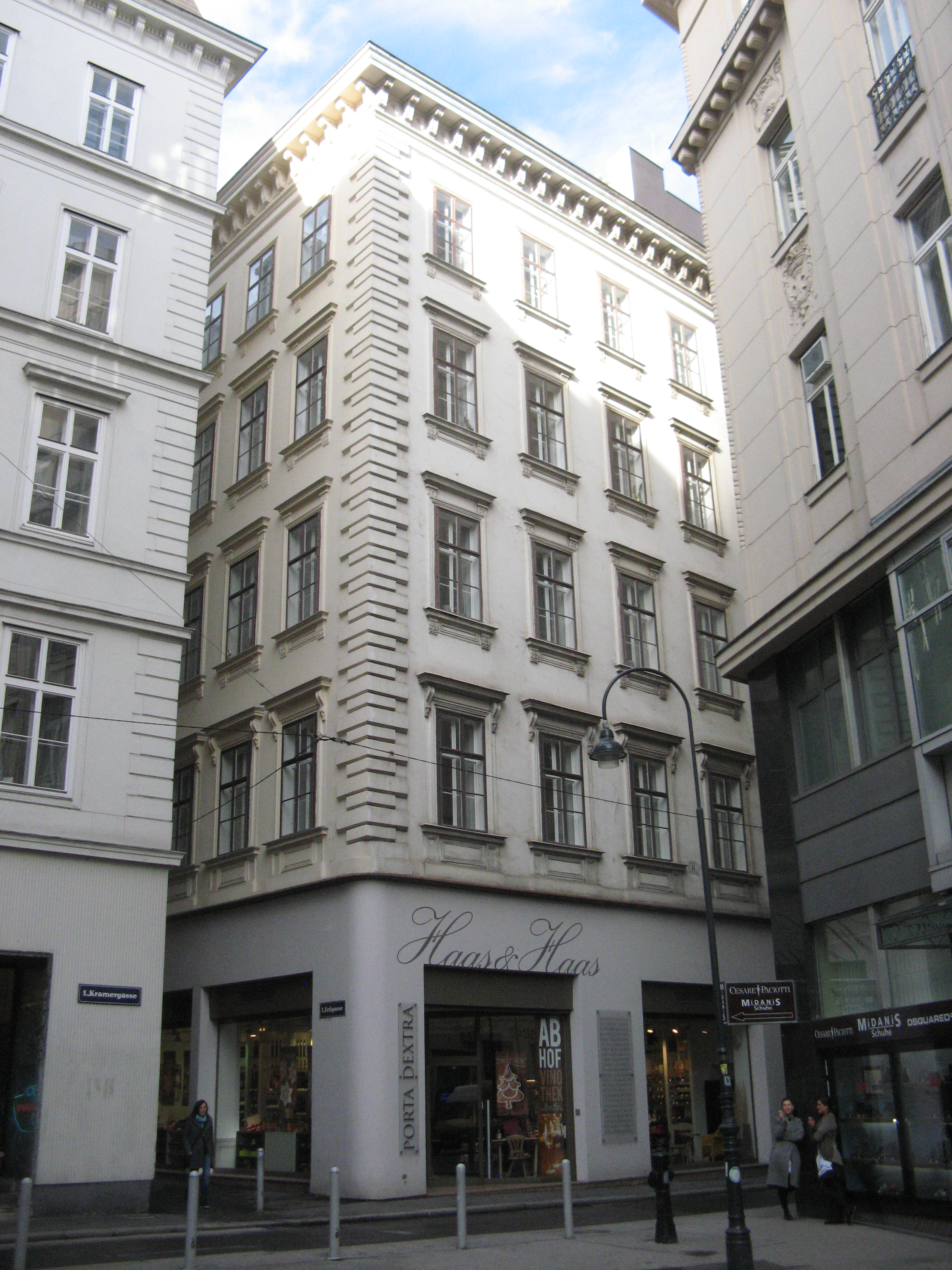 Haus (1842) von Franz Ram, Ertlgasse 4, Wien-Innere Stadt